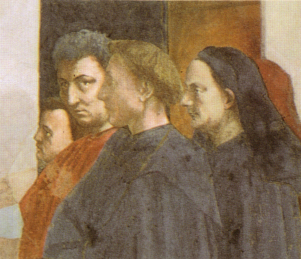 Cappella brancacci, San Pietro in cattedra, dettaglio ritratti di Masaccio, Brunelleschi, Alberti e Masolino (restaurato), Masaccio